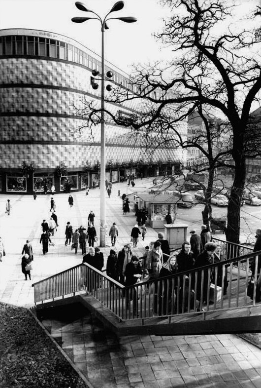 Leipzig, "Konsument"-Warenhaus ADN-ZB Gahlbeck 9.12.1978-reh-Leipzig: Dezembertag am Richard-Wagner-Platz im Leipziger Stadtzentrum.